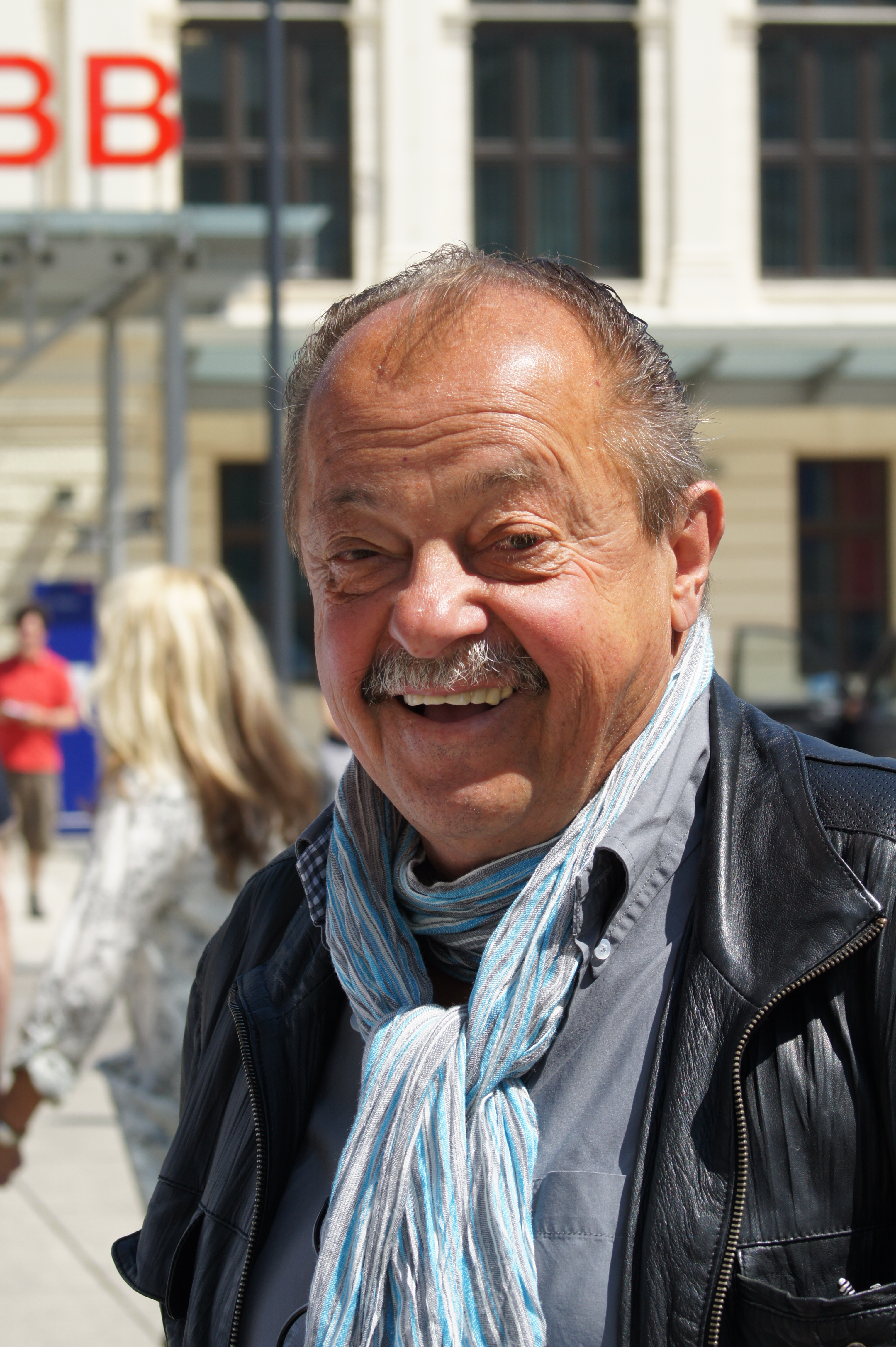 Der St. Pöltner Lokalpolitiker (FPÖ/Liste Für St. Pölten/Liste Nonner/FPÖ) Hermann Nonner